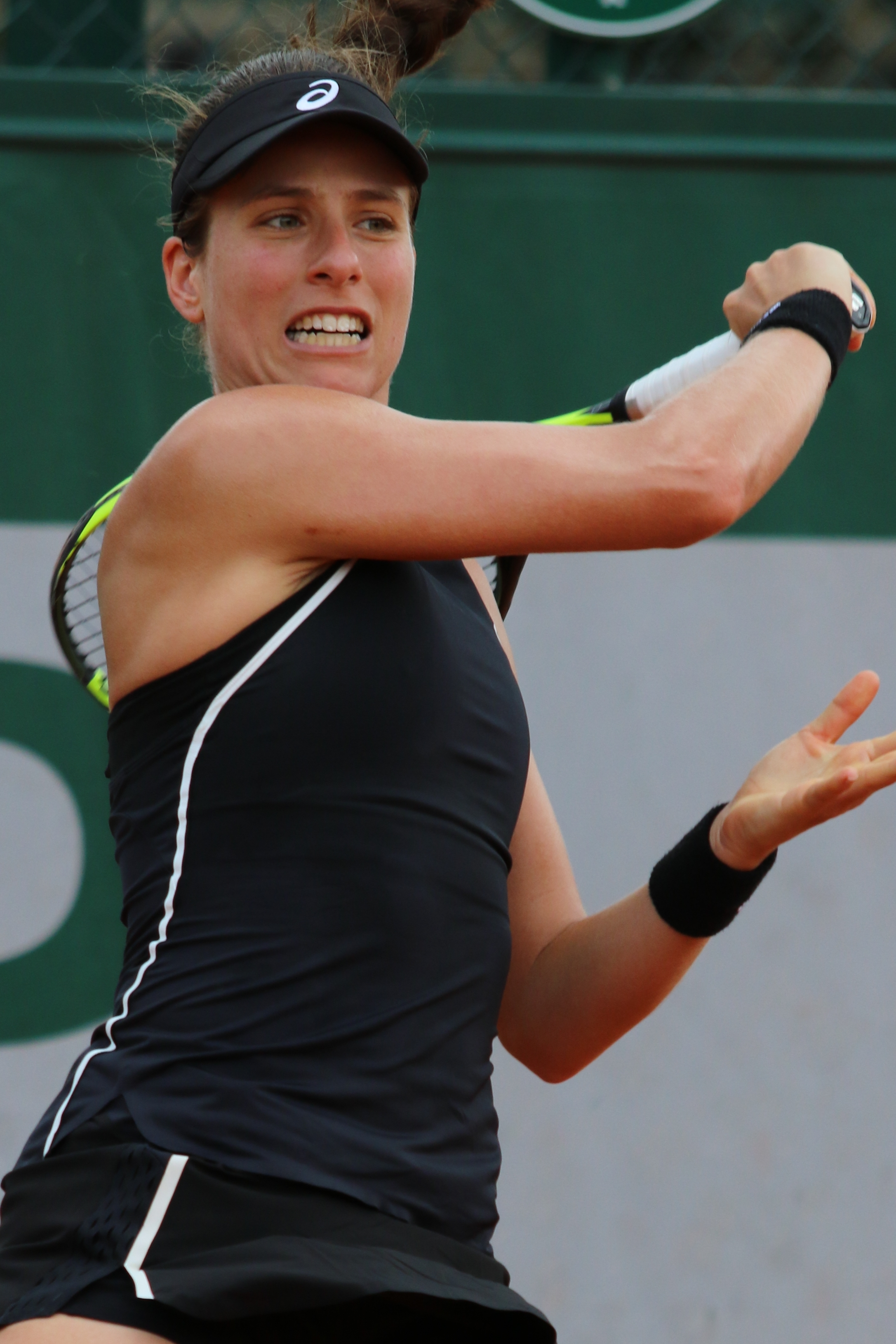 Konta RG18 (1)